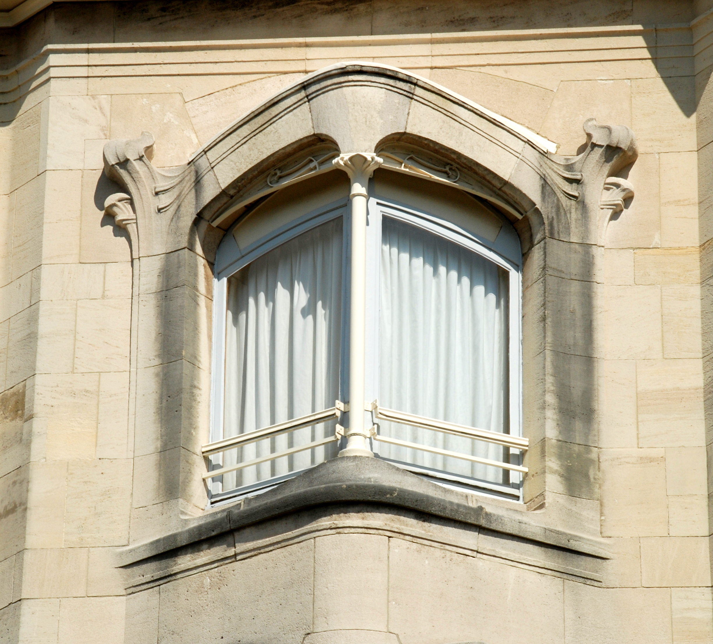 Belgique - Bruxelles - Hôtel Van Eetvelde (Art nouveau - Victor Horta - 1895)